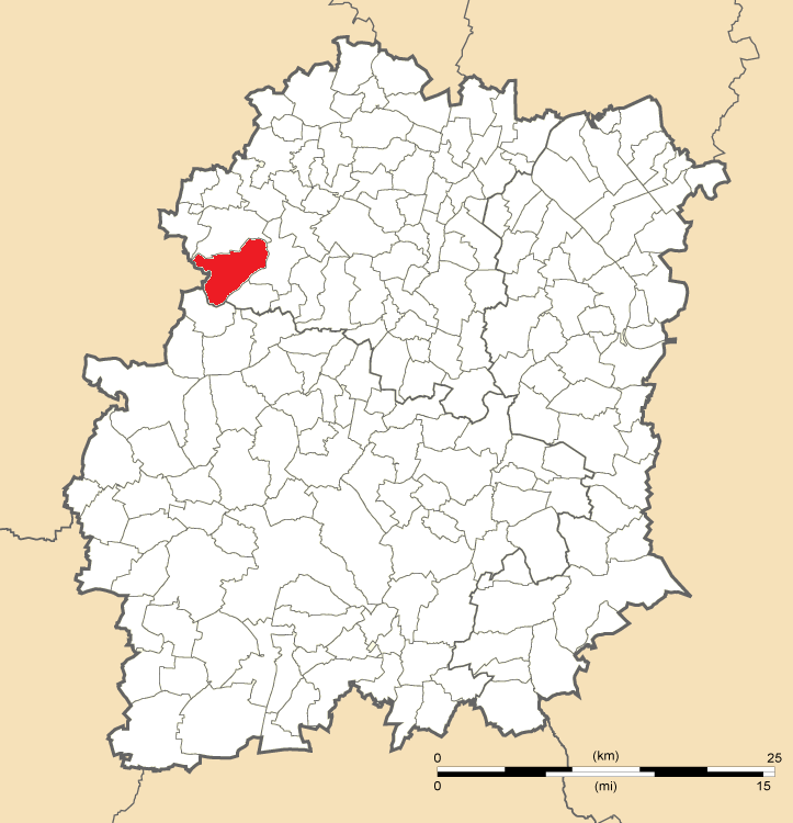 Carte de position de Forges-les-Bains en Essonne (91)